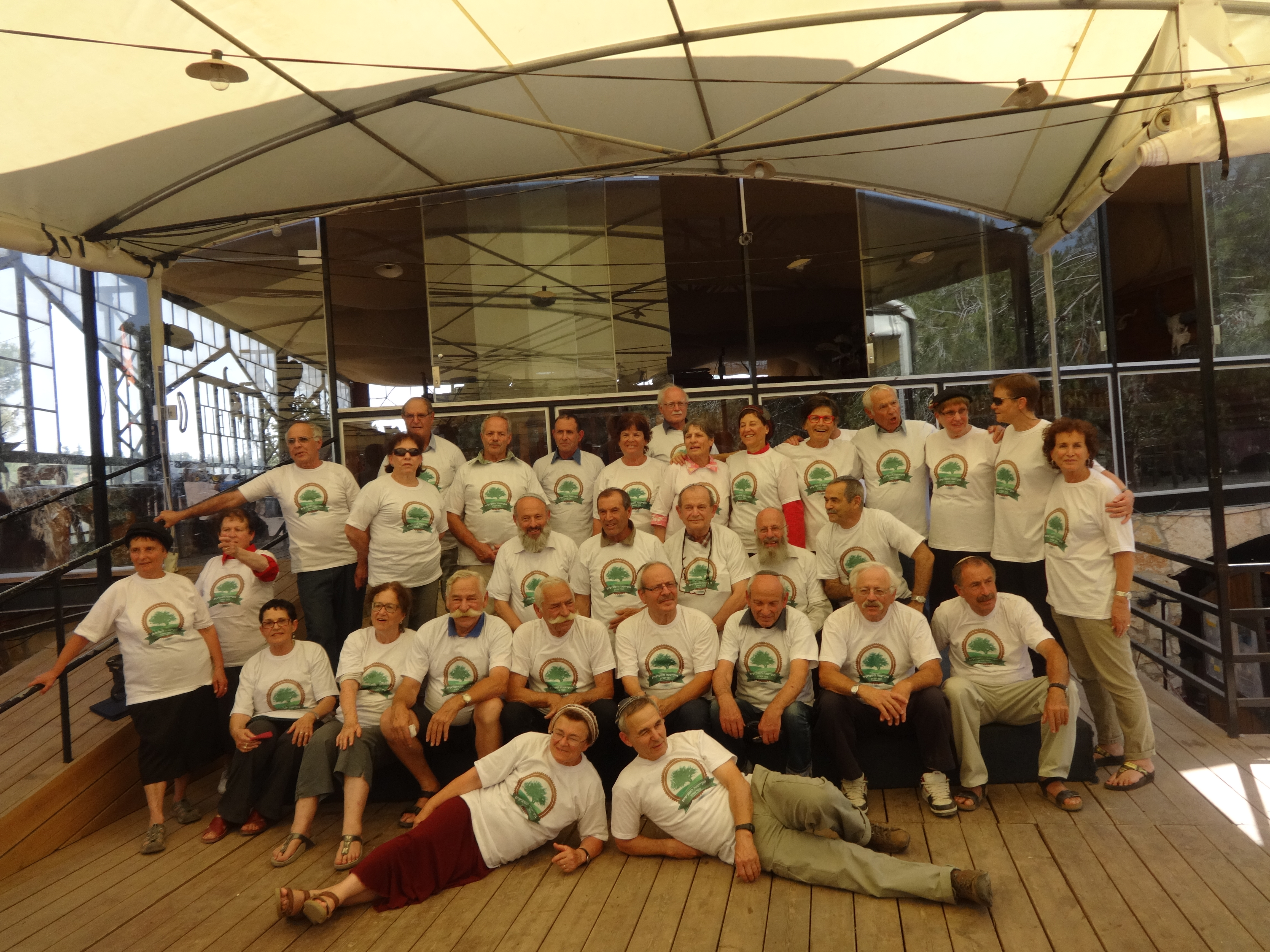 מתוך הסרט הקייטנה השביעית